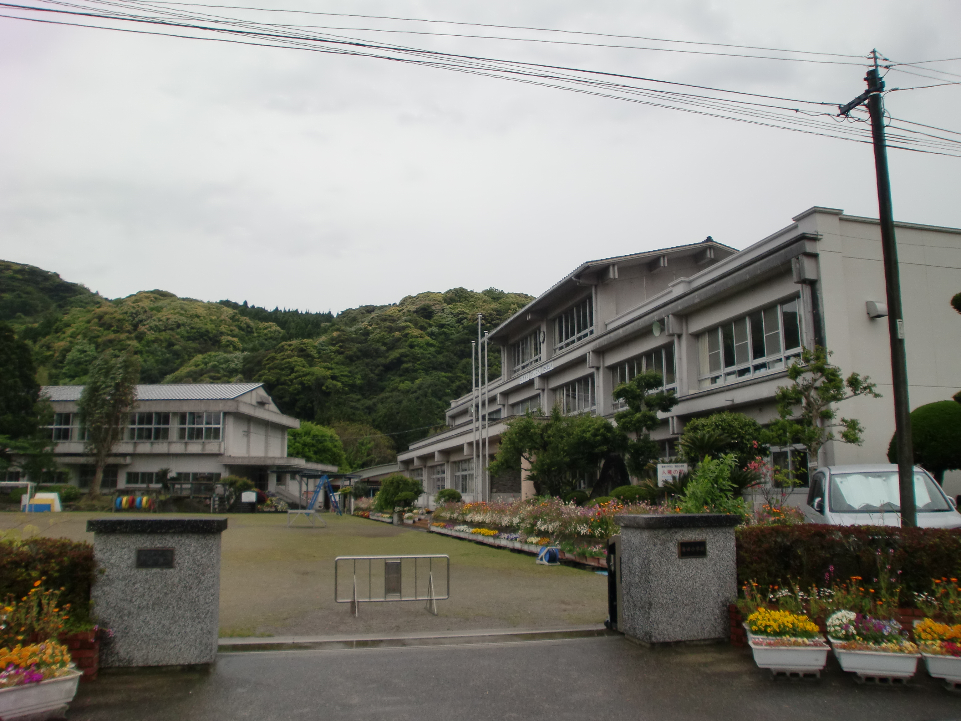 薩摩川内市立湯田小学校の外観。